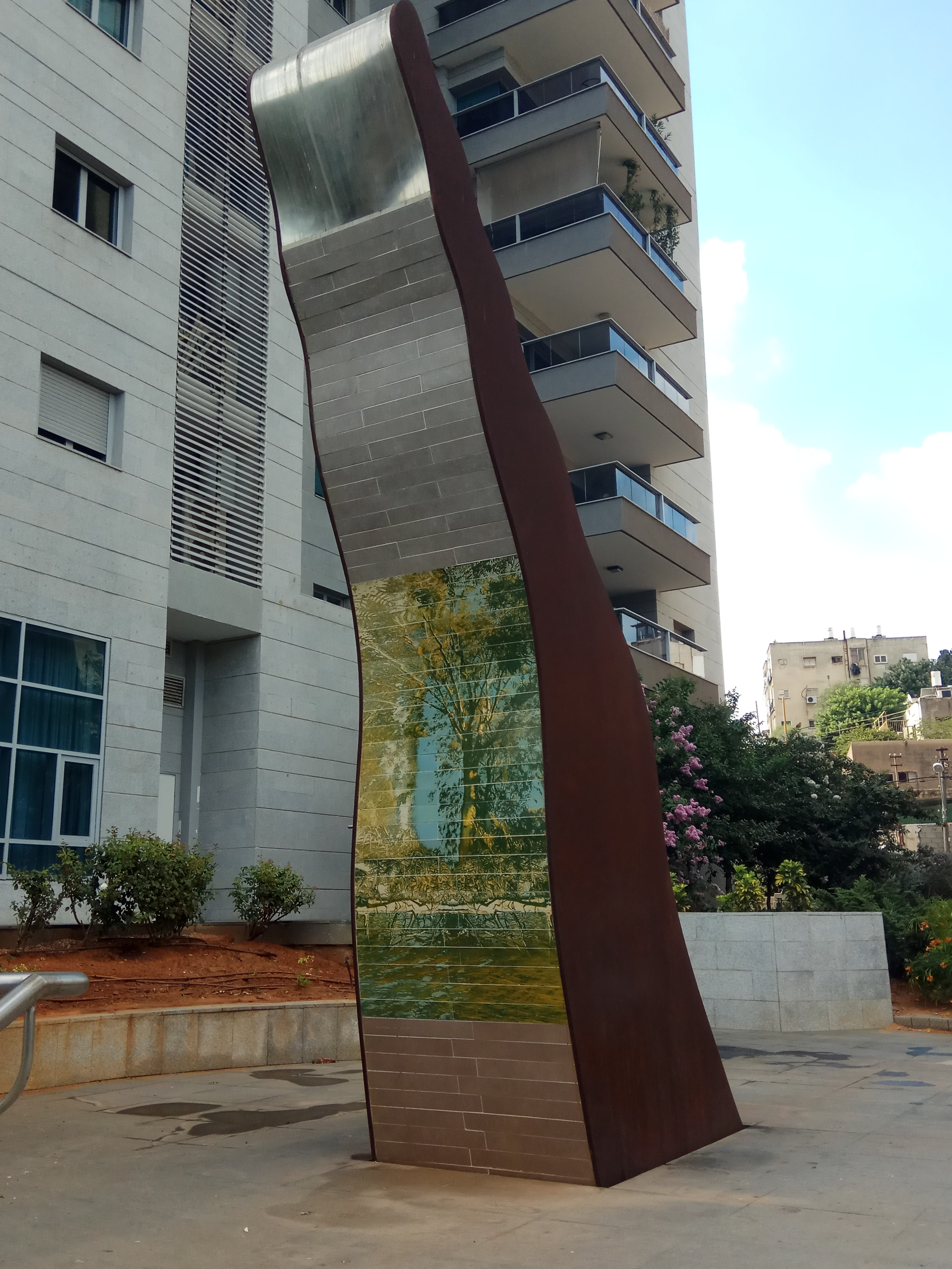 הפסל "קו שמיים" של ורד פלדמן (2012) בסוף רחוב אבא הלל ברמת גן